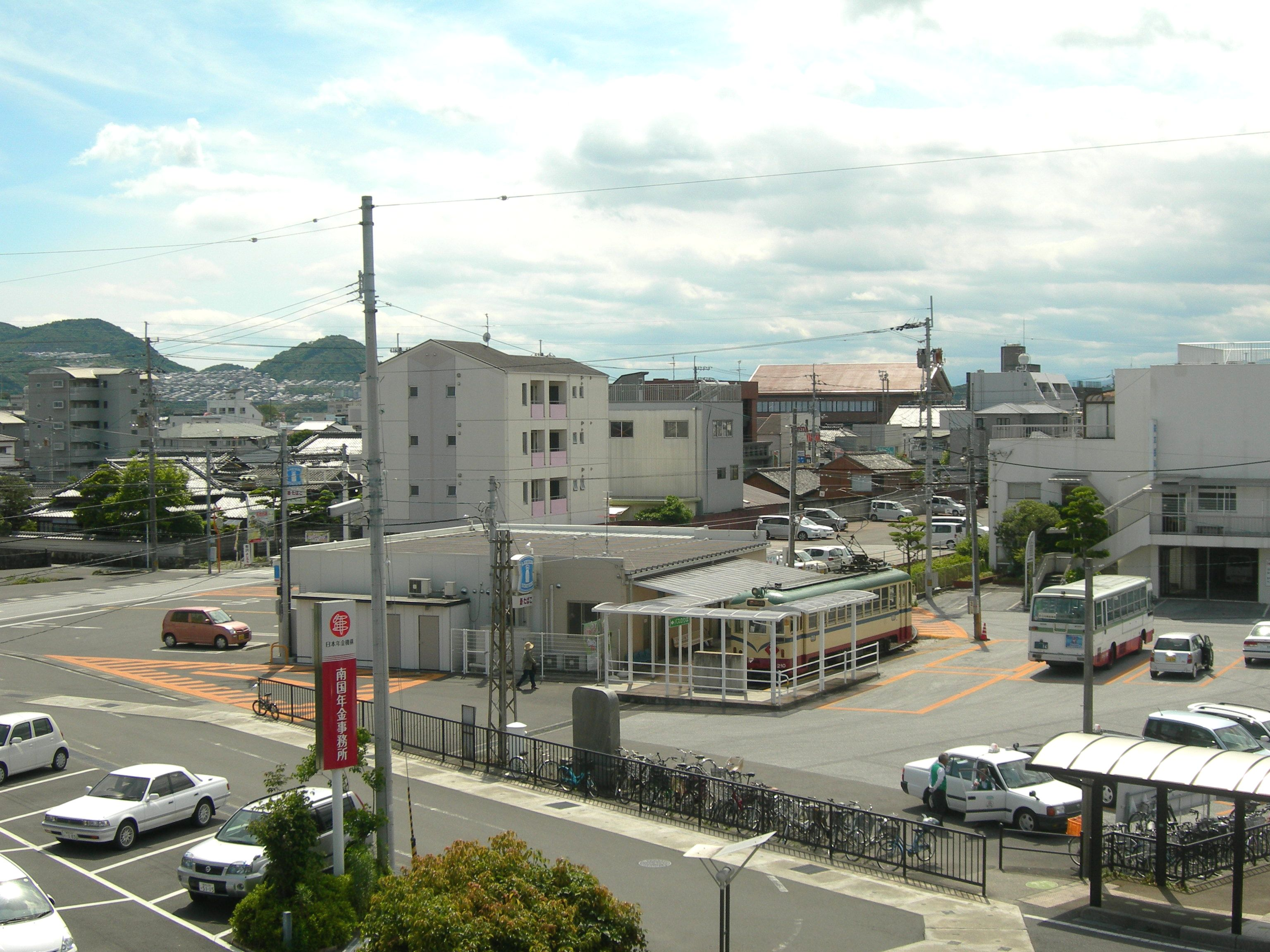 土佐電気鉄道 後免町駅